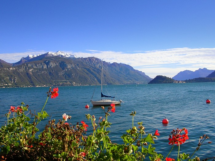 Lago di Como: Bellagio selfmade picture taken in november 2004